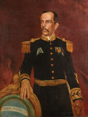 Pintura de Floriano Vieira Peixoto da Presidência da República Federativa do Brasil.